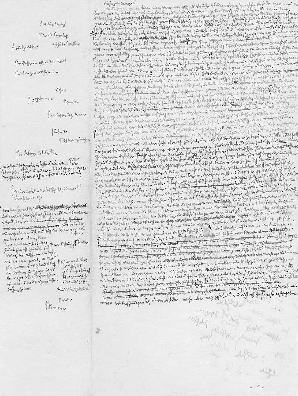 Manuskript »Kaiserpanorama« aus dem Felizitas-Konvolut der »Berliner Kindheit neunzehnhundert«. Herbst 1932. Original: 27,2 x 20,5 cm.